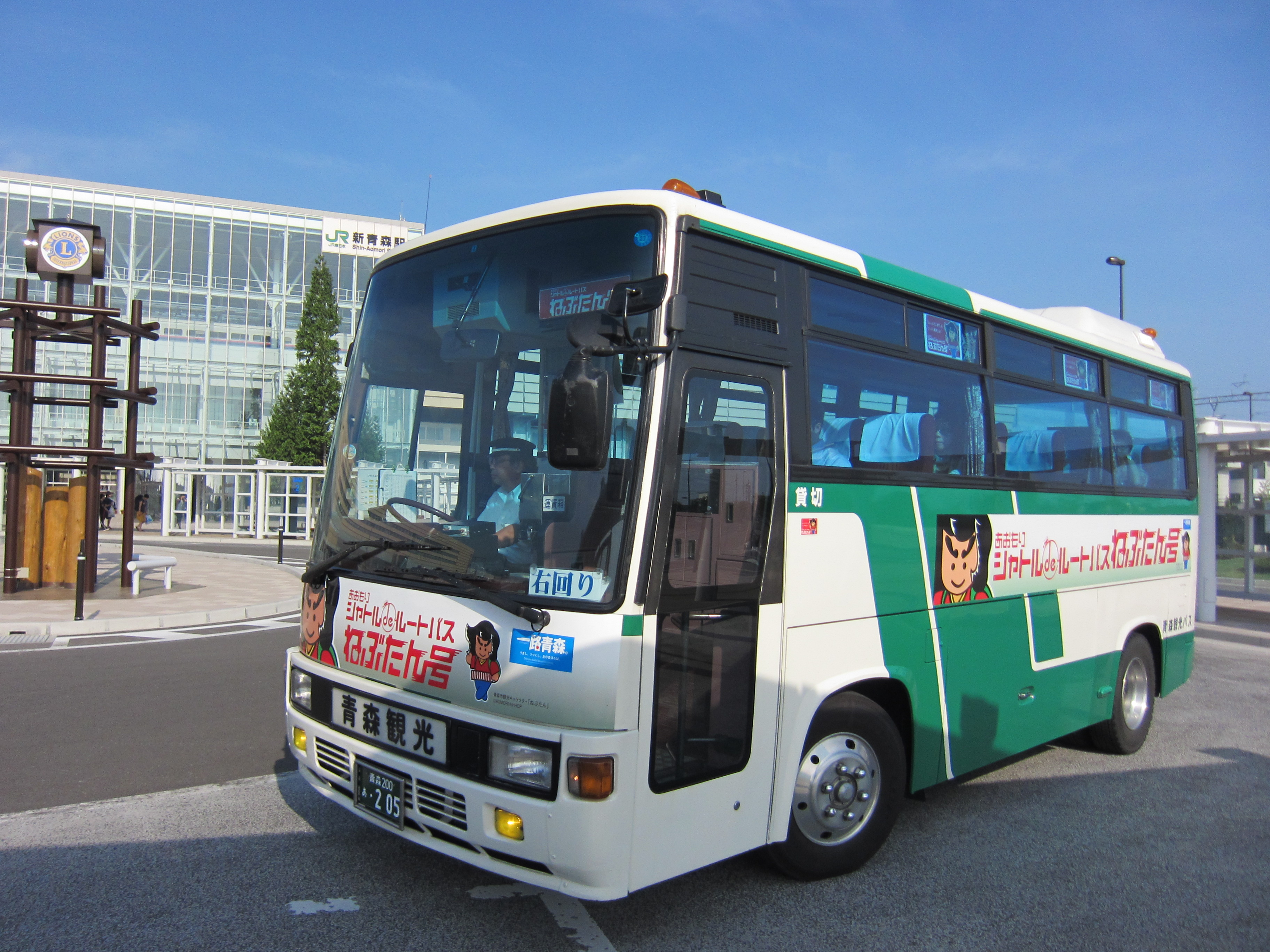 青森観光ねぶたん号 新青森駅前にて撮影